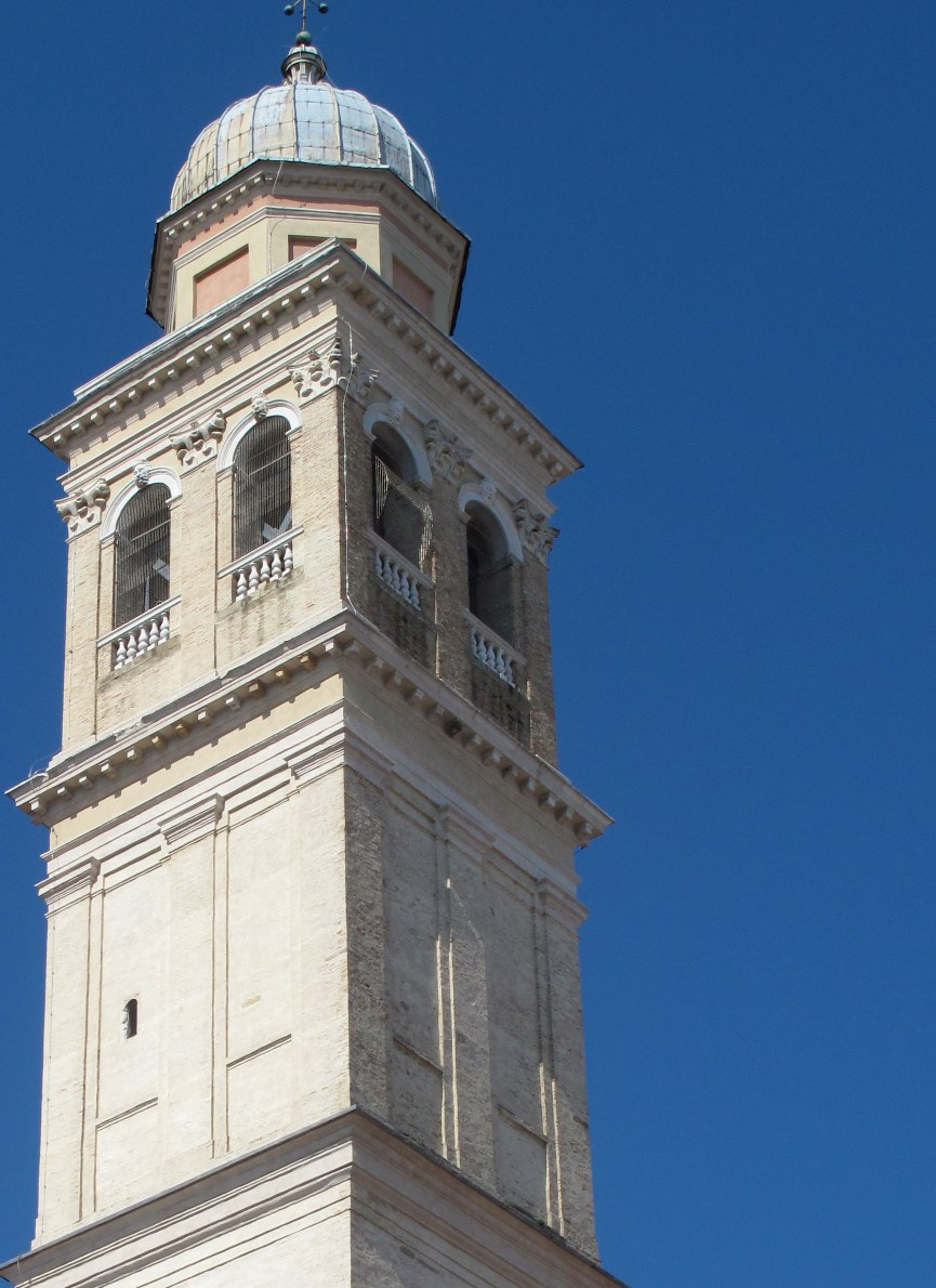 Padova juil 09 235